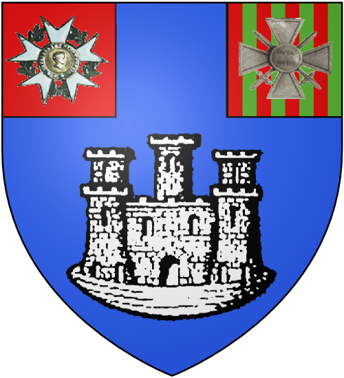 Saint-Dizier Blason de Saint-Dizier (52448) re-dessiné par Benoit D-F fr:2006